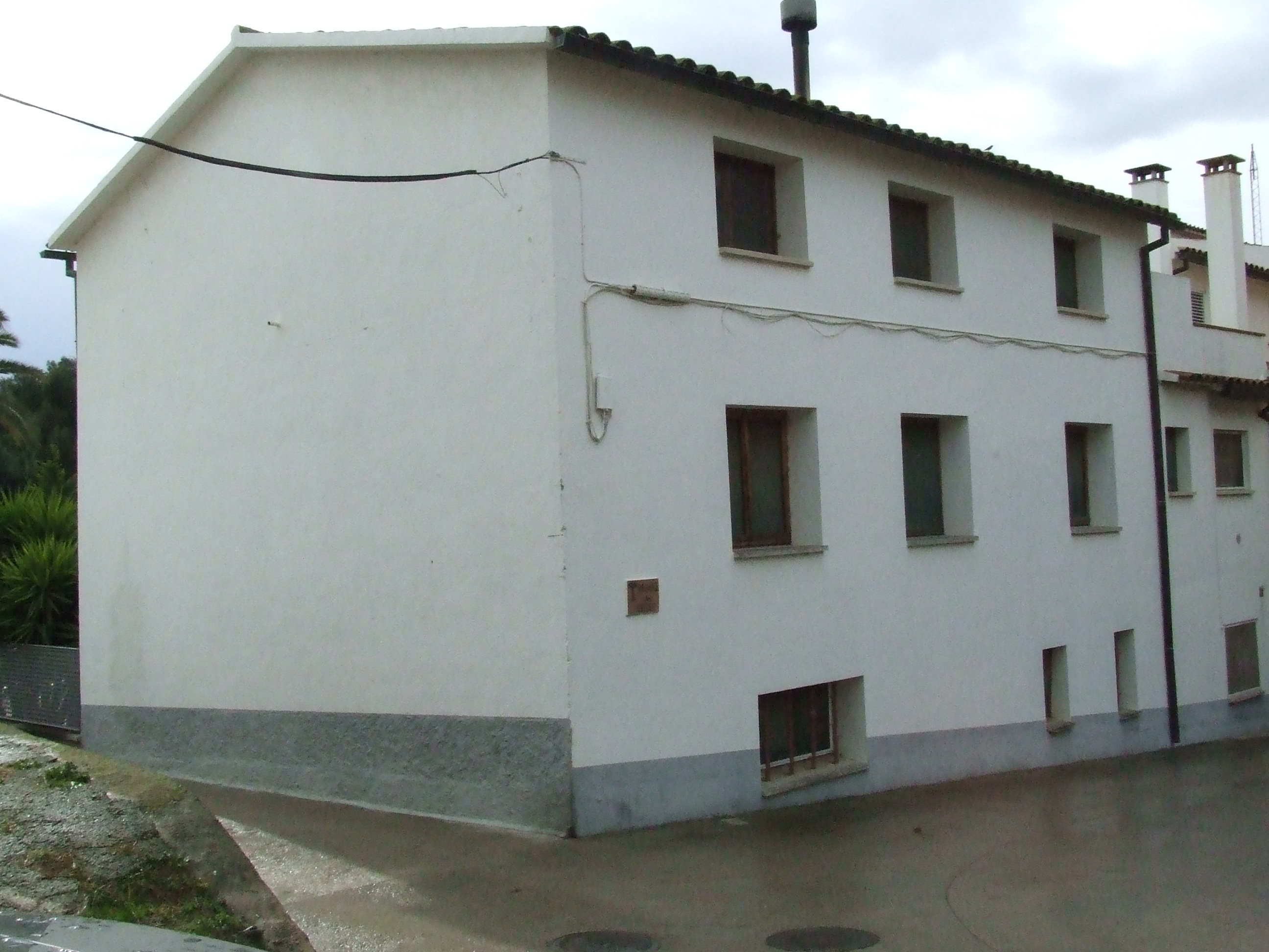 Can Pratcorona (Bigues, Bigues i Riells, Vallès Oriental)